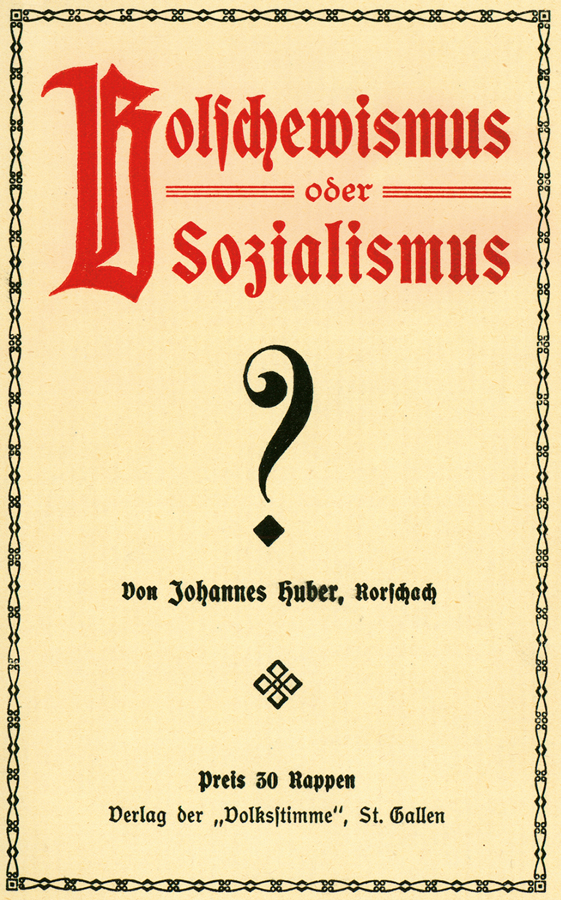 Titelseite einer Broschüre, veröffentlicht 1918 in St. Gallen. Nach dem Generalstreik vom November 1918 publizierte Johannes Huber, der als Anwalt Mitglieder des Oltener Aktionskomitees verteidigte, diese Broschüre beim Organ der St. Galler Sozialdemokratie 'Volksstimme'. Er erklärt darin die ideologischen Unterschiede und Gegensätze zwischen dem Bolschewismus und dem Sozialismus, indem er die verschiedenen Entstehungskontexte der beiden Richtungen aufzeigt.